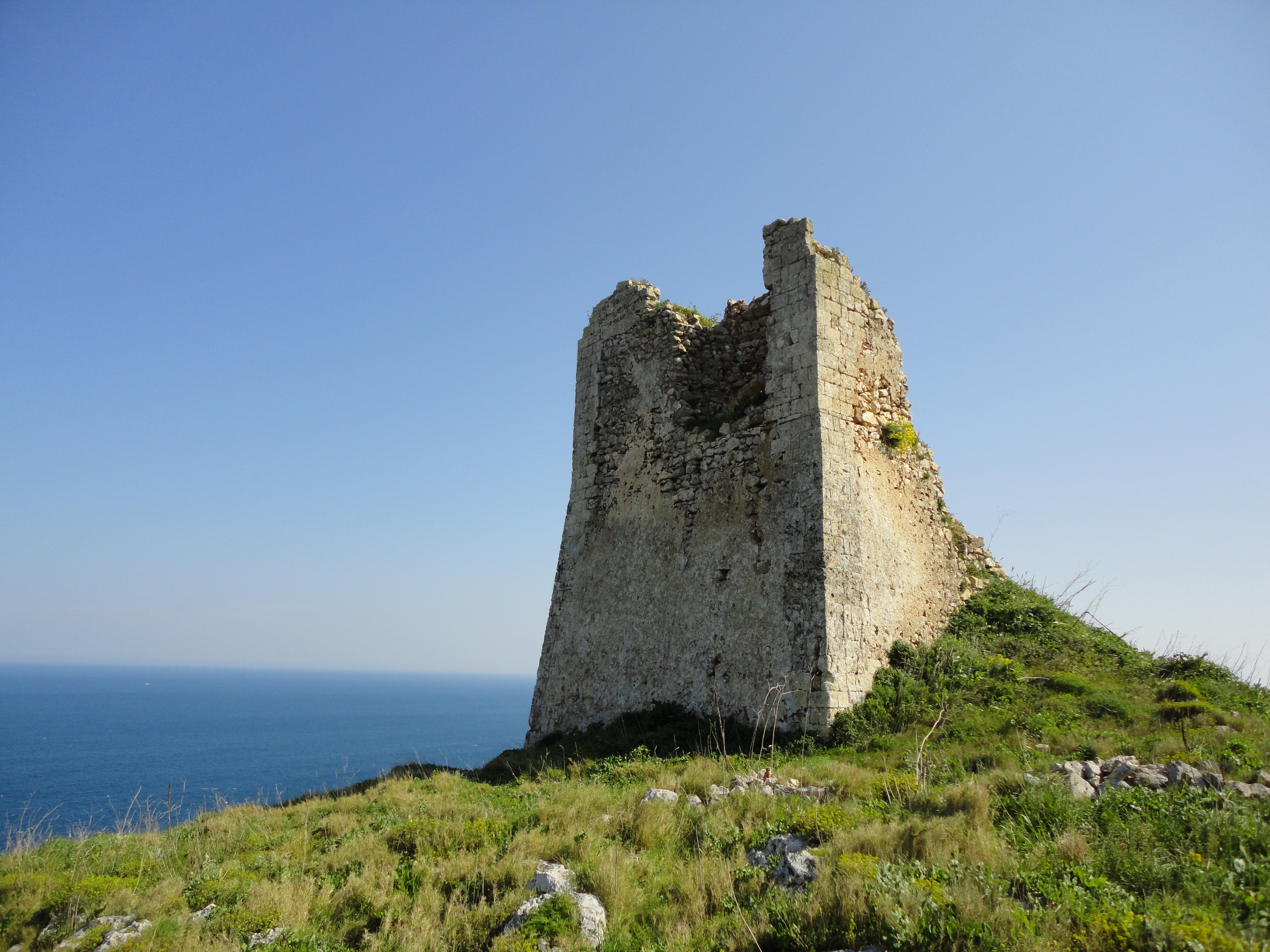 Torre del Sasso Tricase, Lecce